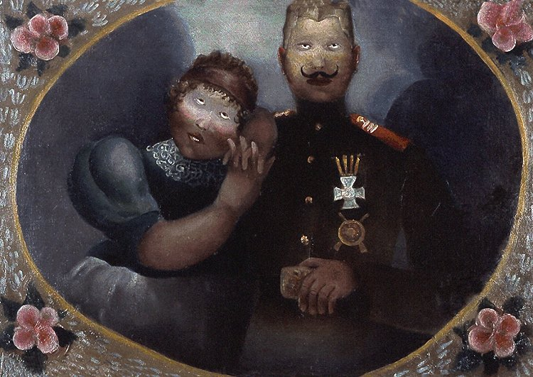 "Солдат с возлюбленной", картина Григория Алексеевича Мусатова